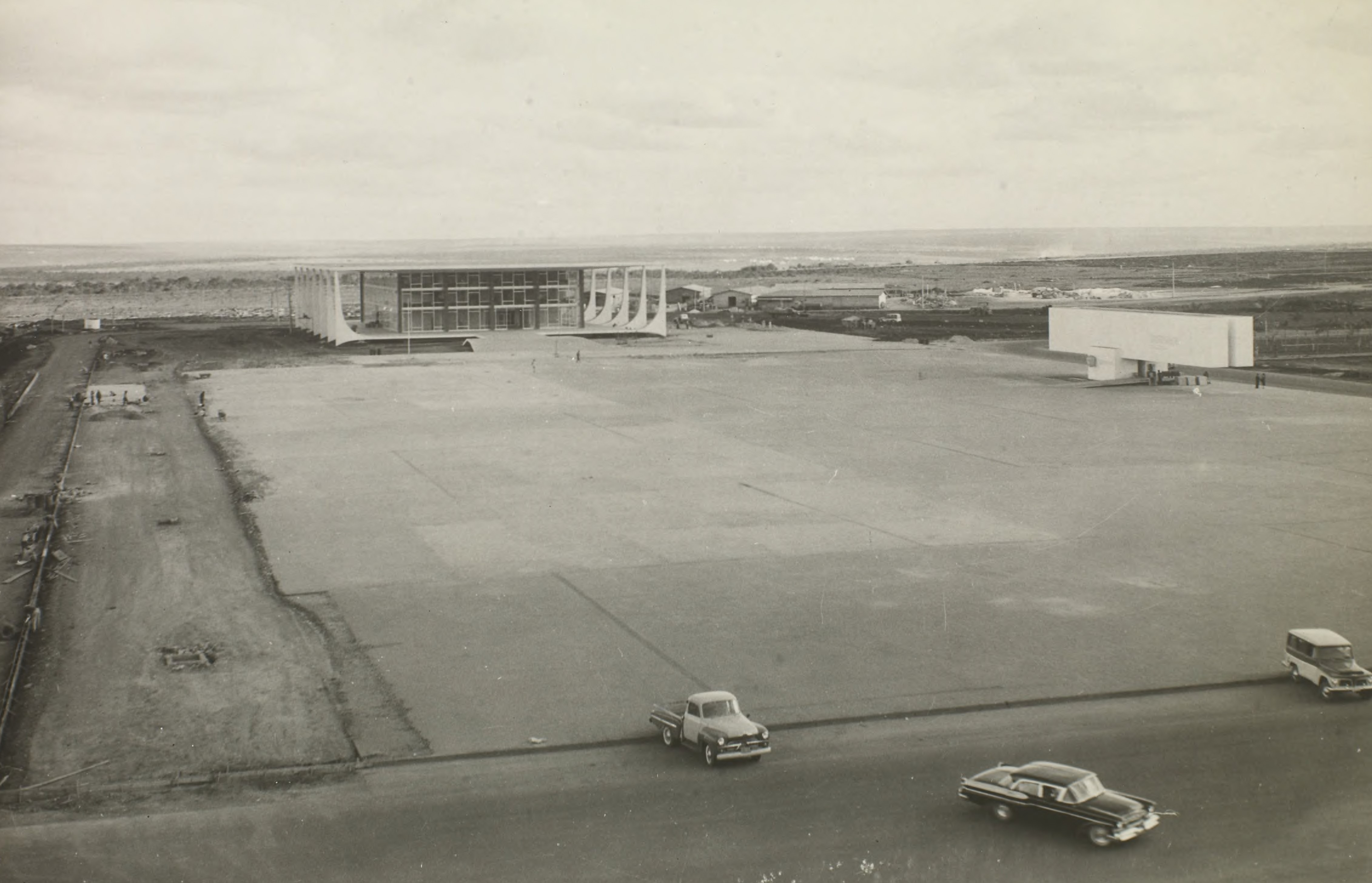 Fotografia do Fundo Correio da Manhã, sob a guarda do Arquivo Nacional.